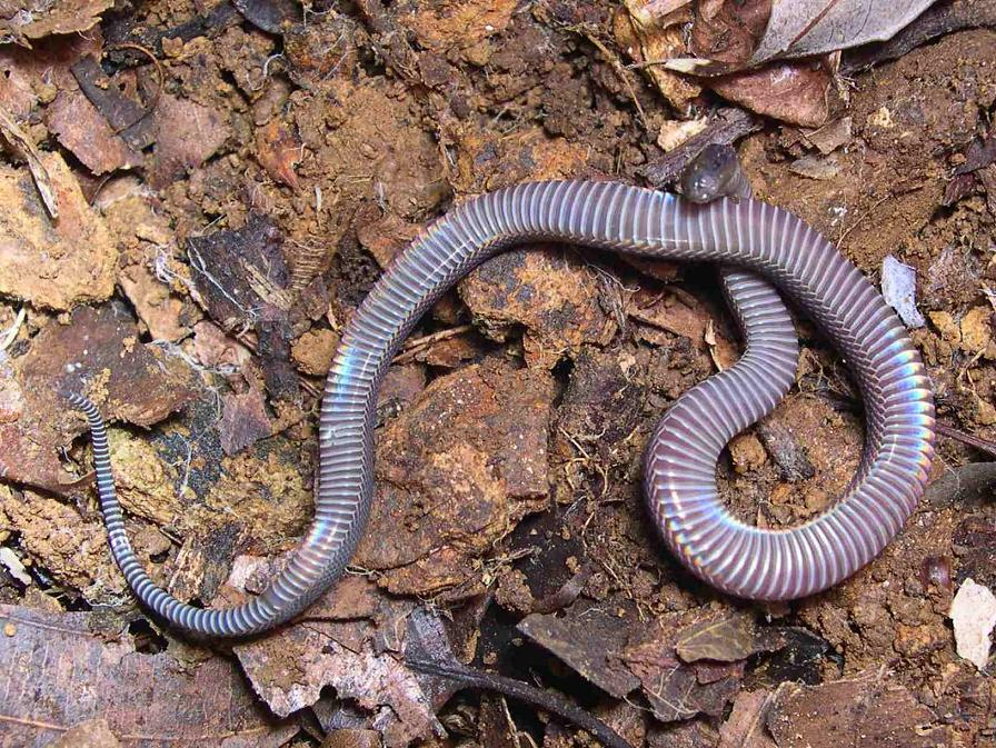 Juvenile Japanese Odd-scaled Snake, Achalinus spinalis W. Peters, 1869 (Squamata: Serpentes: Colubridae). Total length: aprx 12cm. Loc: Hamamatsu, Shizuoka Prefecture, Japan. ja: タカチホヘビ（ナミヘビ科：タカチホヘビ属）。全長約12ｃｍの幼蛇。腹面。 場所：浜松市